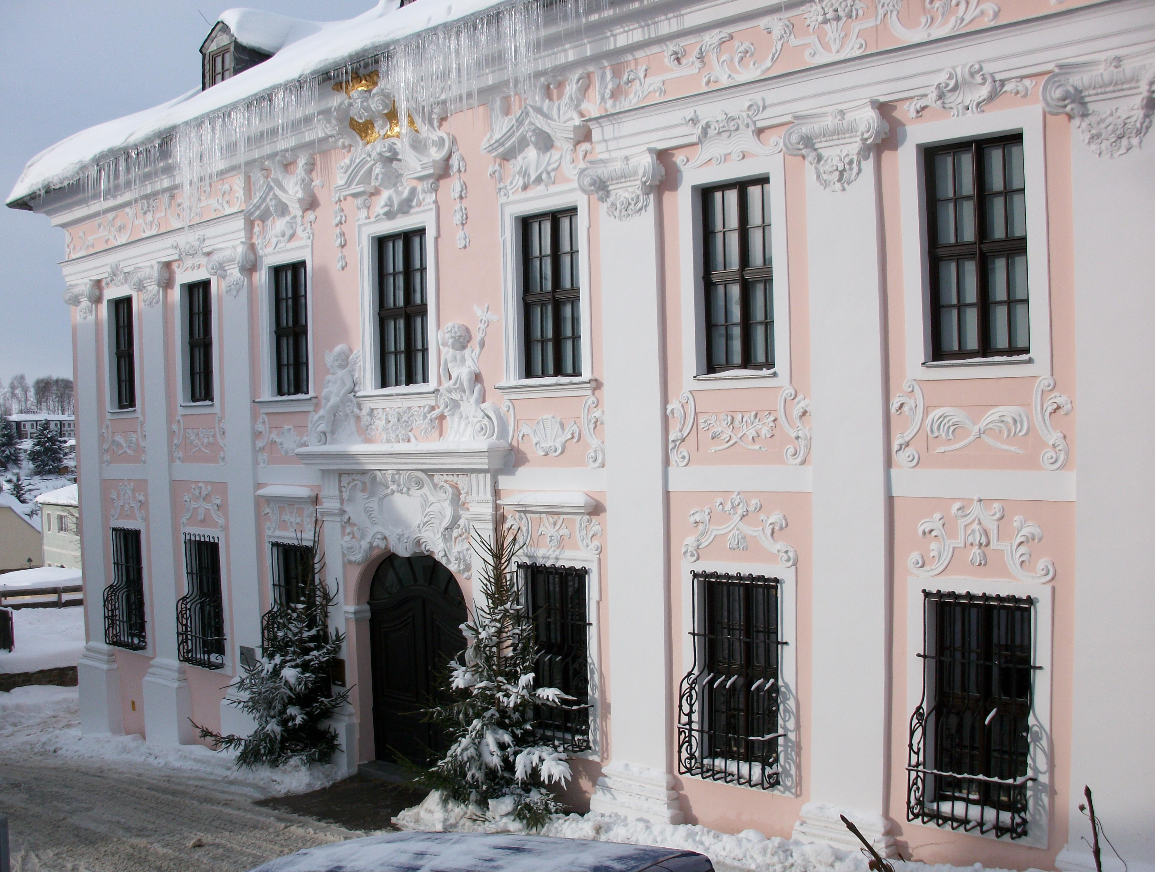 Bortenreuther-Haus Schneeberg/Erzgeb.